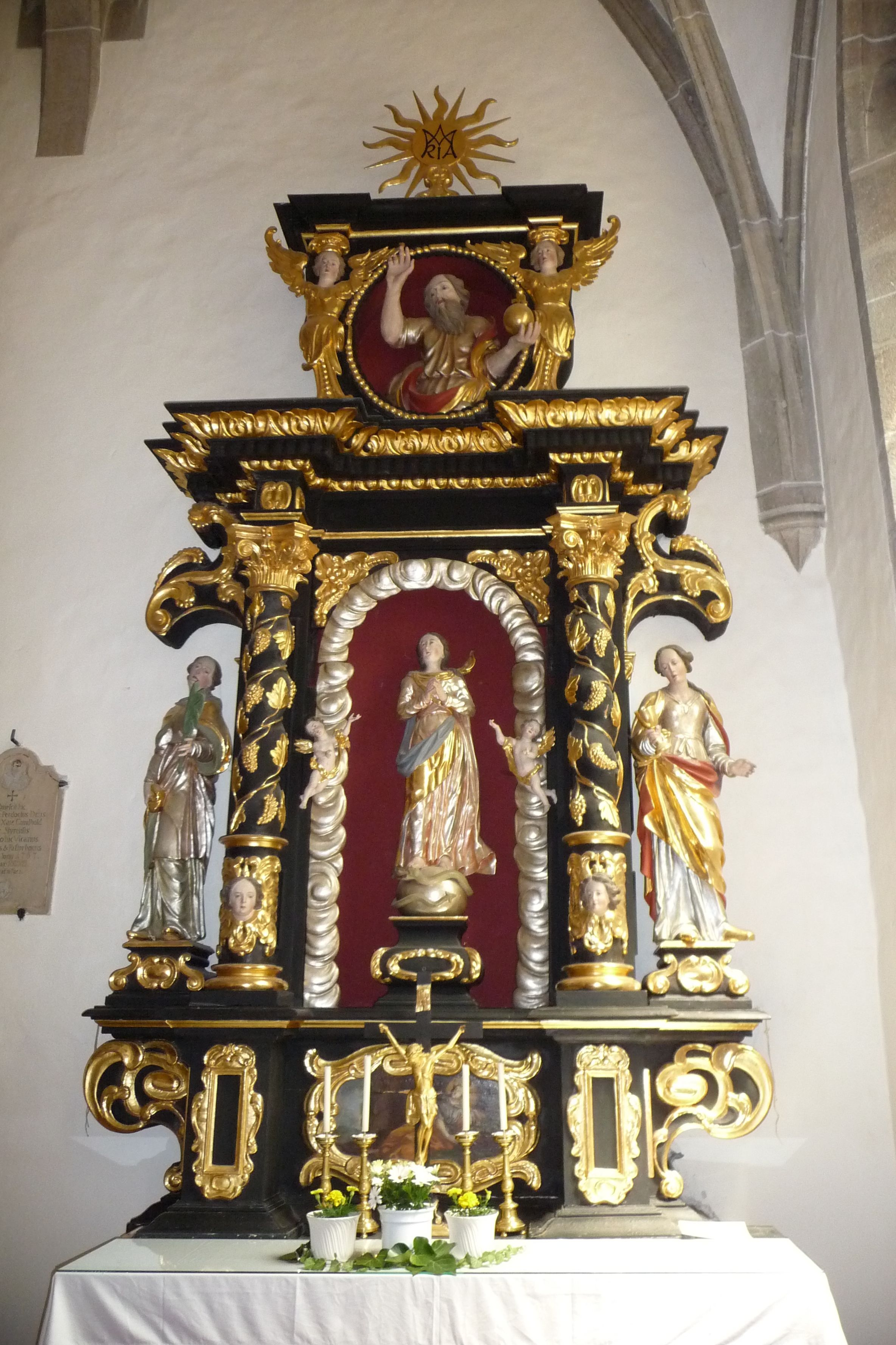 Seitenaltar in der Pfarrkirche Hirschbach Mkr.